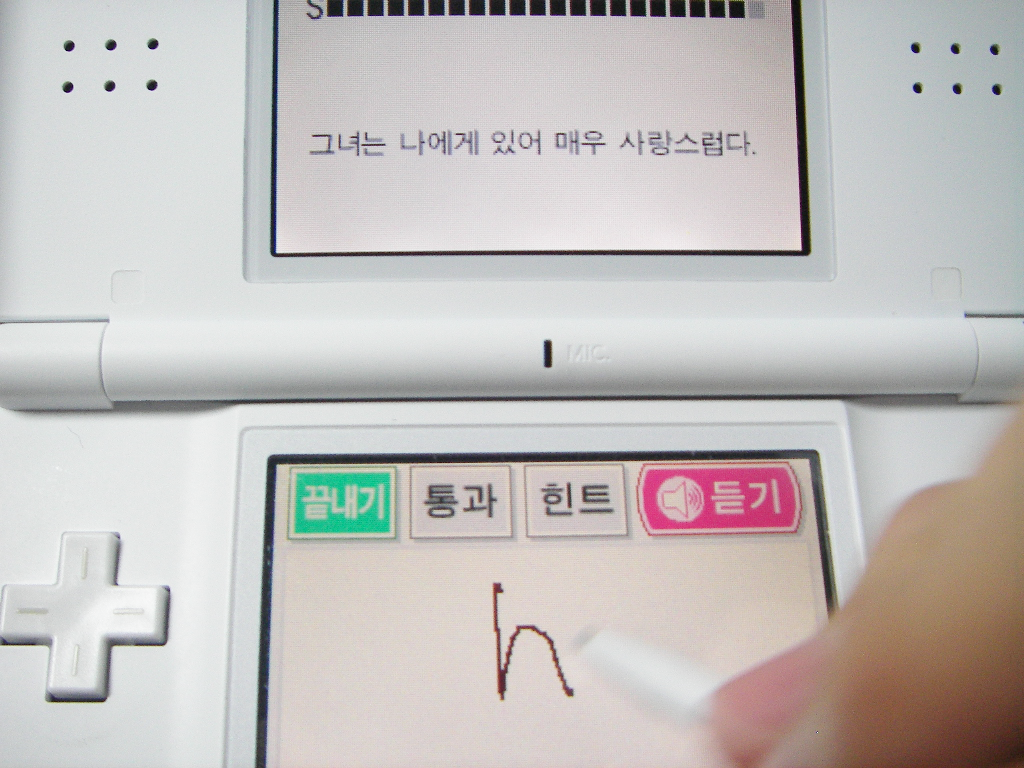 듣고 쓰고 친해지는 DS 영어 삼매경에서 Dictation(받아쓰기)을 하고 있는 모습.